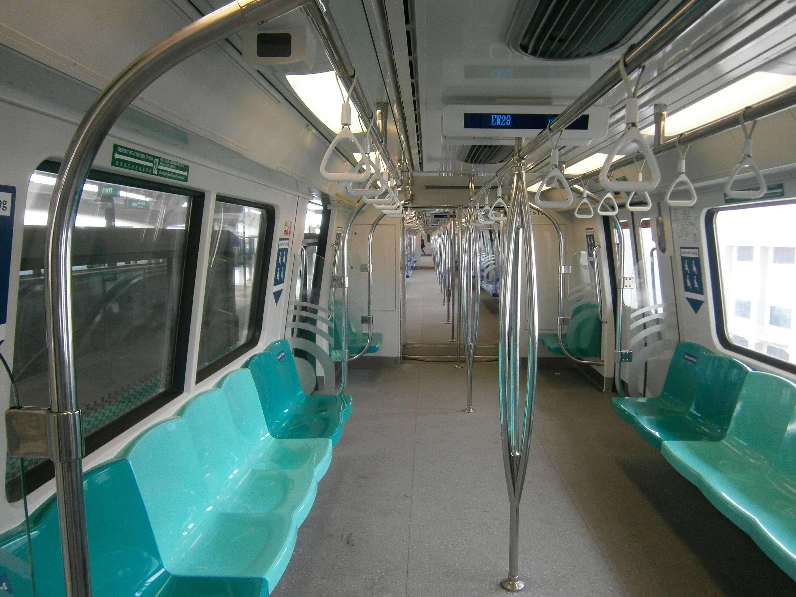 SMRT EW Line